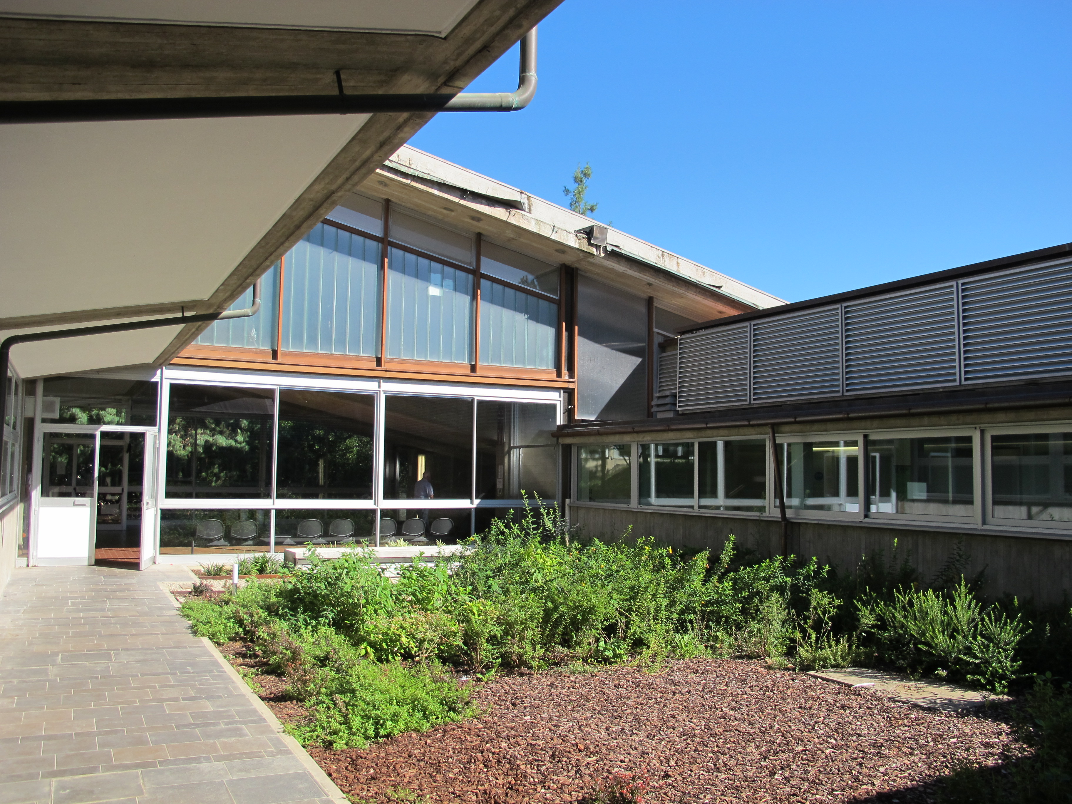 Ospedale Pietro Palagi, Florence